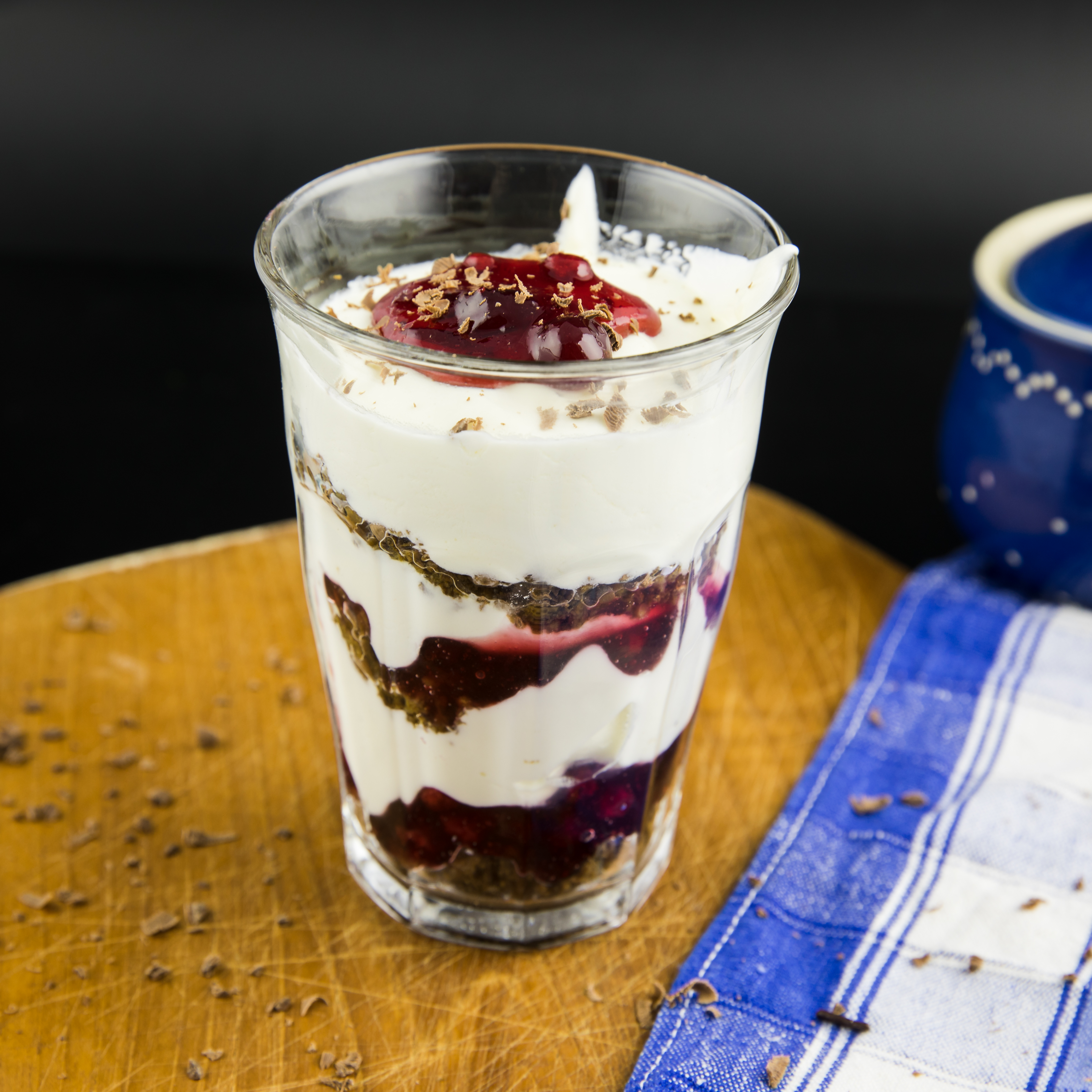 Westfälische Götterspeise, Dessert aus Pumpernickel, Preiselbeerkompott und einer Quark-Sahne-Mischung, geschichtet in einem Glas. Hier noch ergänzt von etwas geraspelter Schokolade (im Pumpernickel und als Dekoration.